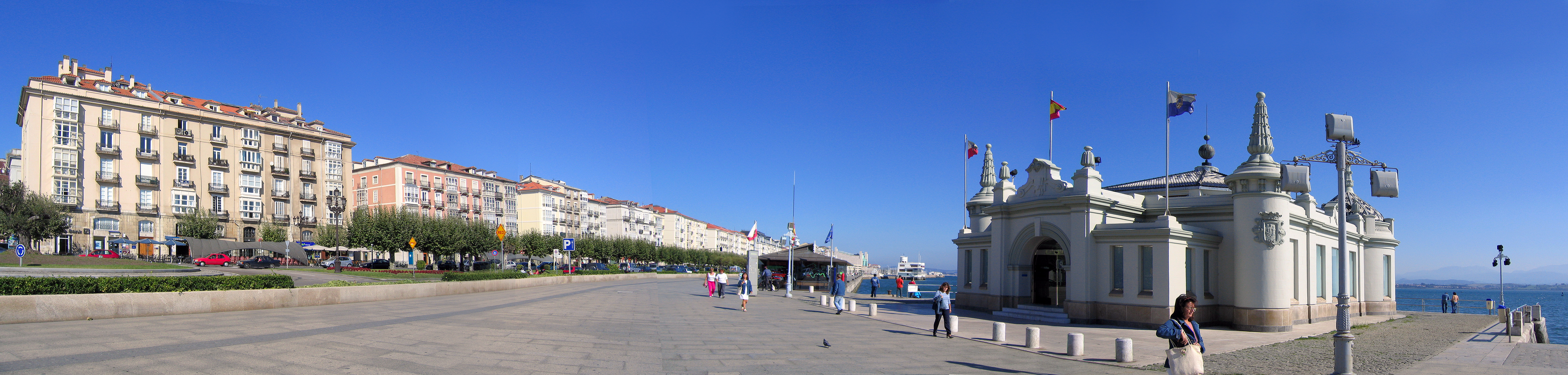 2005. Paseo de Pereda